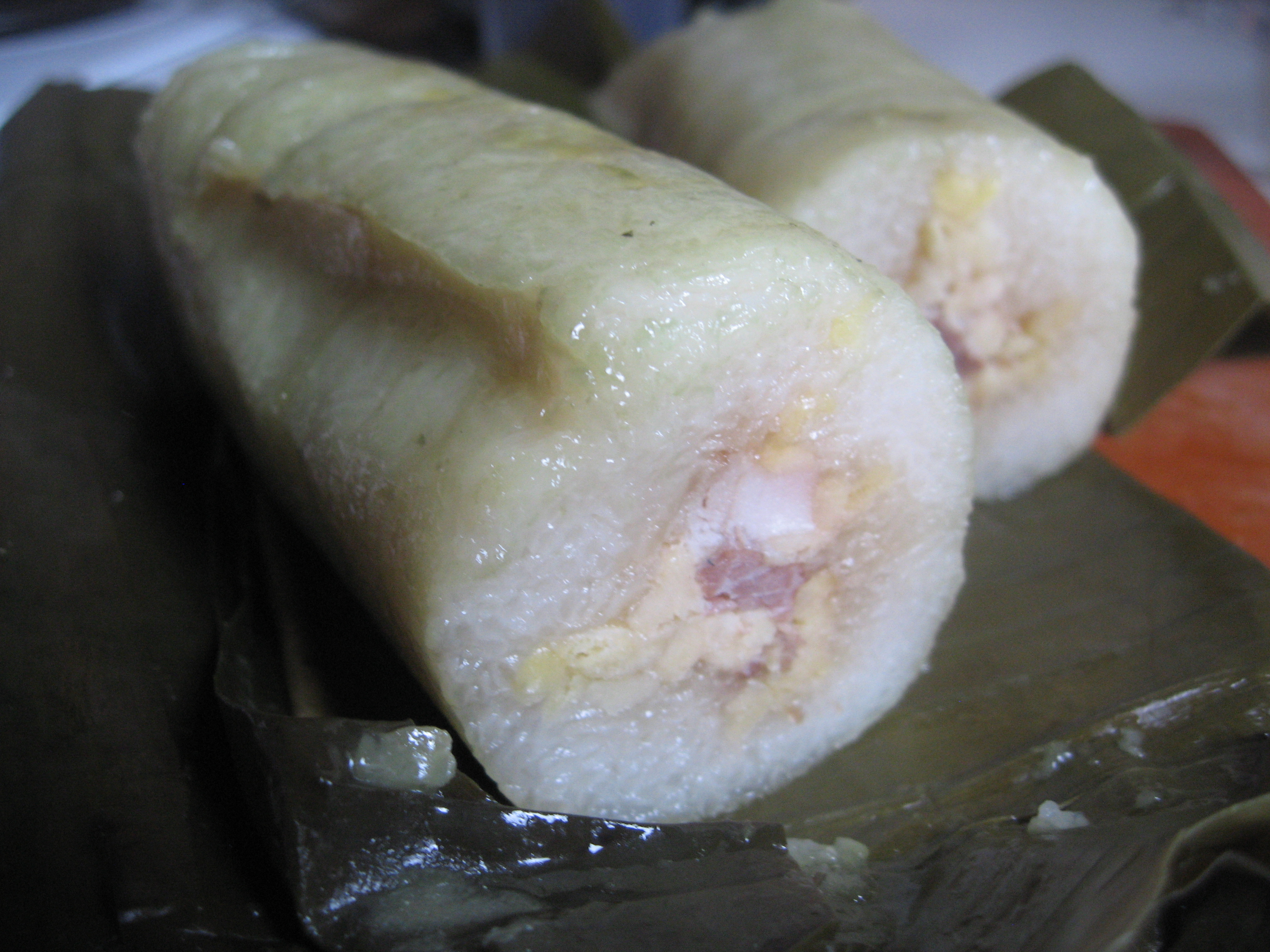 @ Thanh Son Tofu